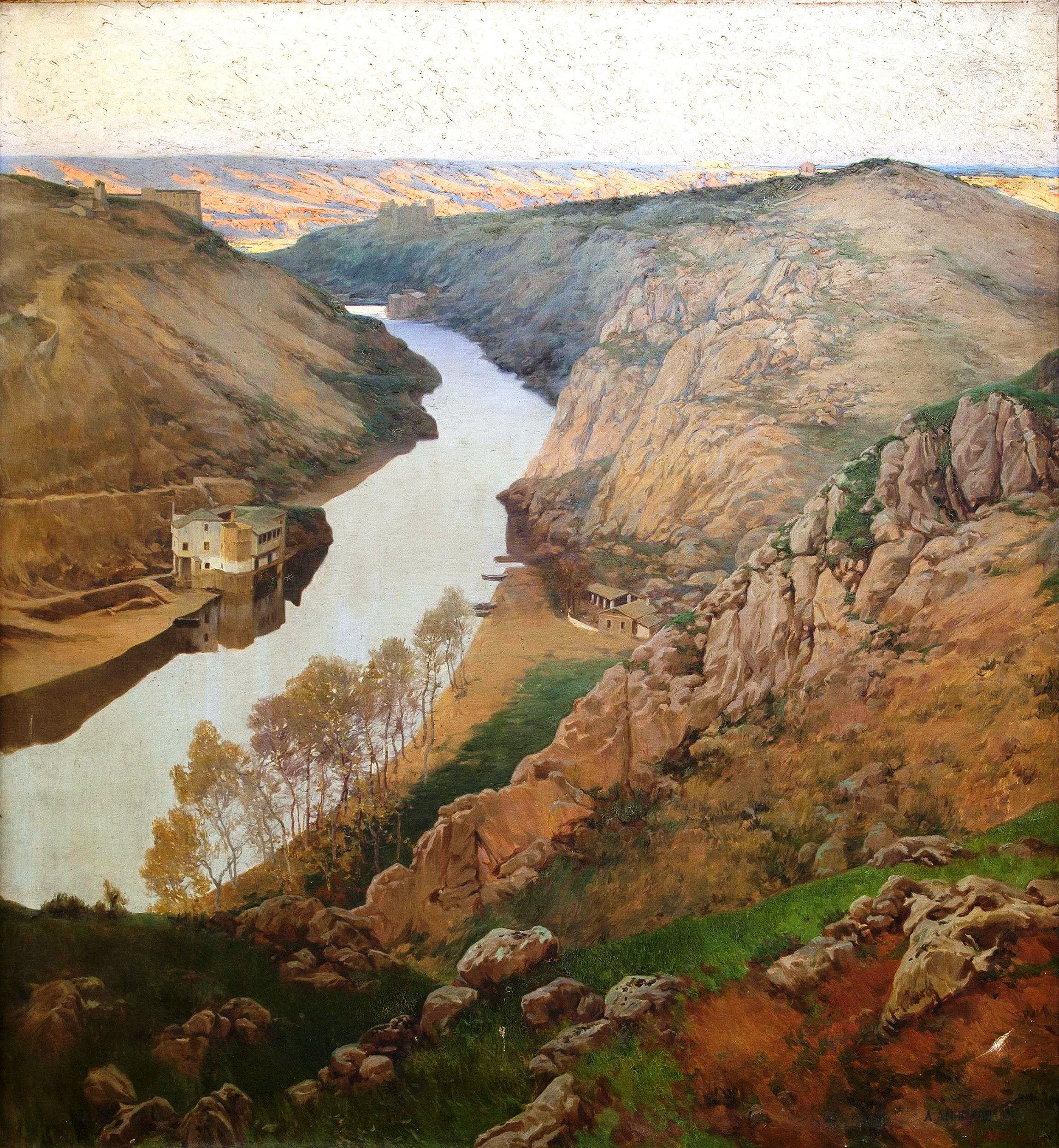 La obra representa el río Tajo a su paso por las cercanías de la ciudad de Toledo, en España.